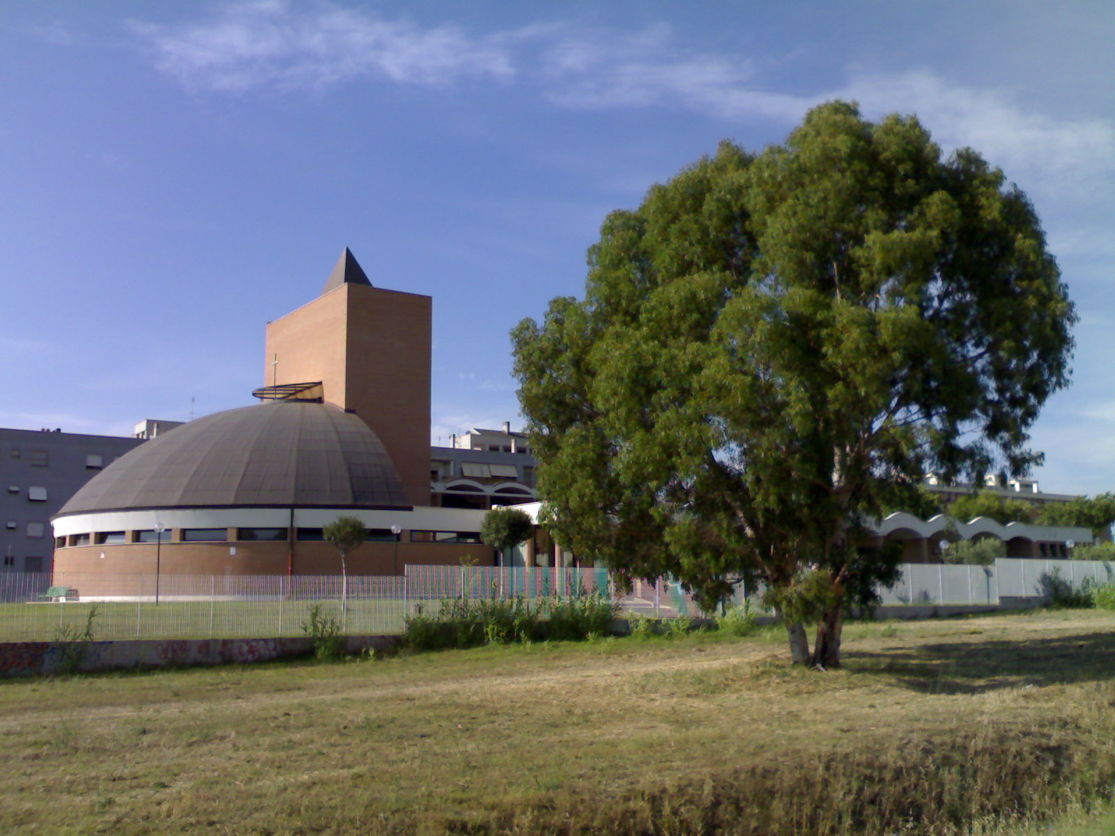 Eucaliptus globulus accanto alla chiesa di San Giorgio ad Acilia, Roma